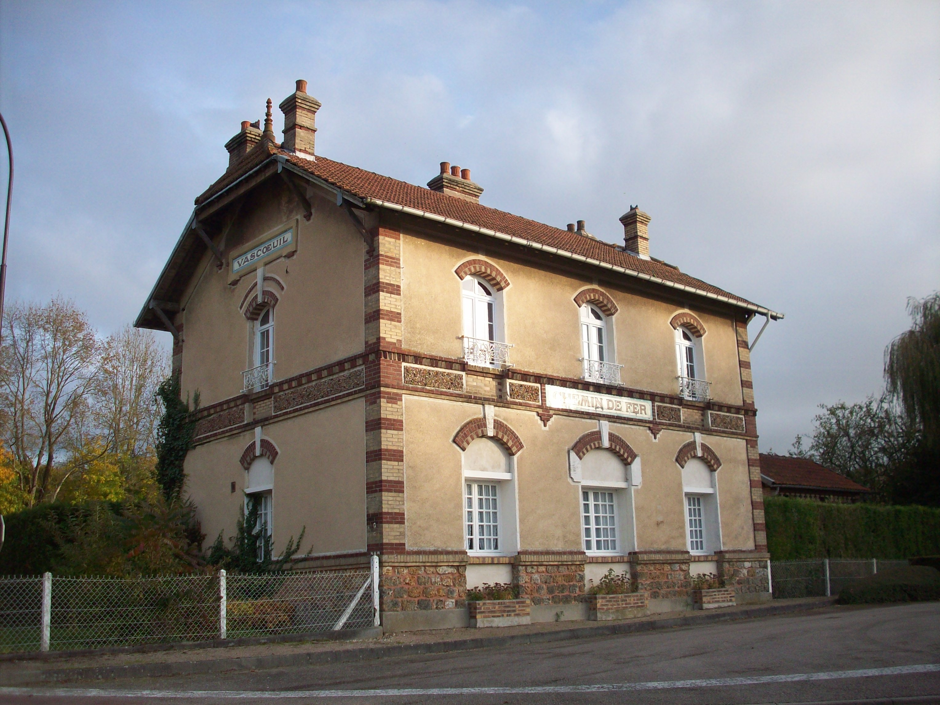 Ancienne gare de Vascoeuil, de la ligne Charleval-Serqueux.